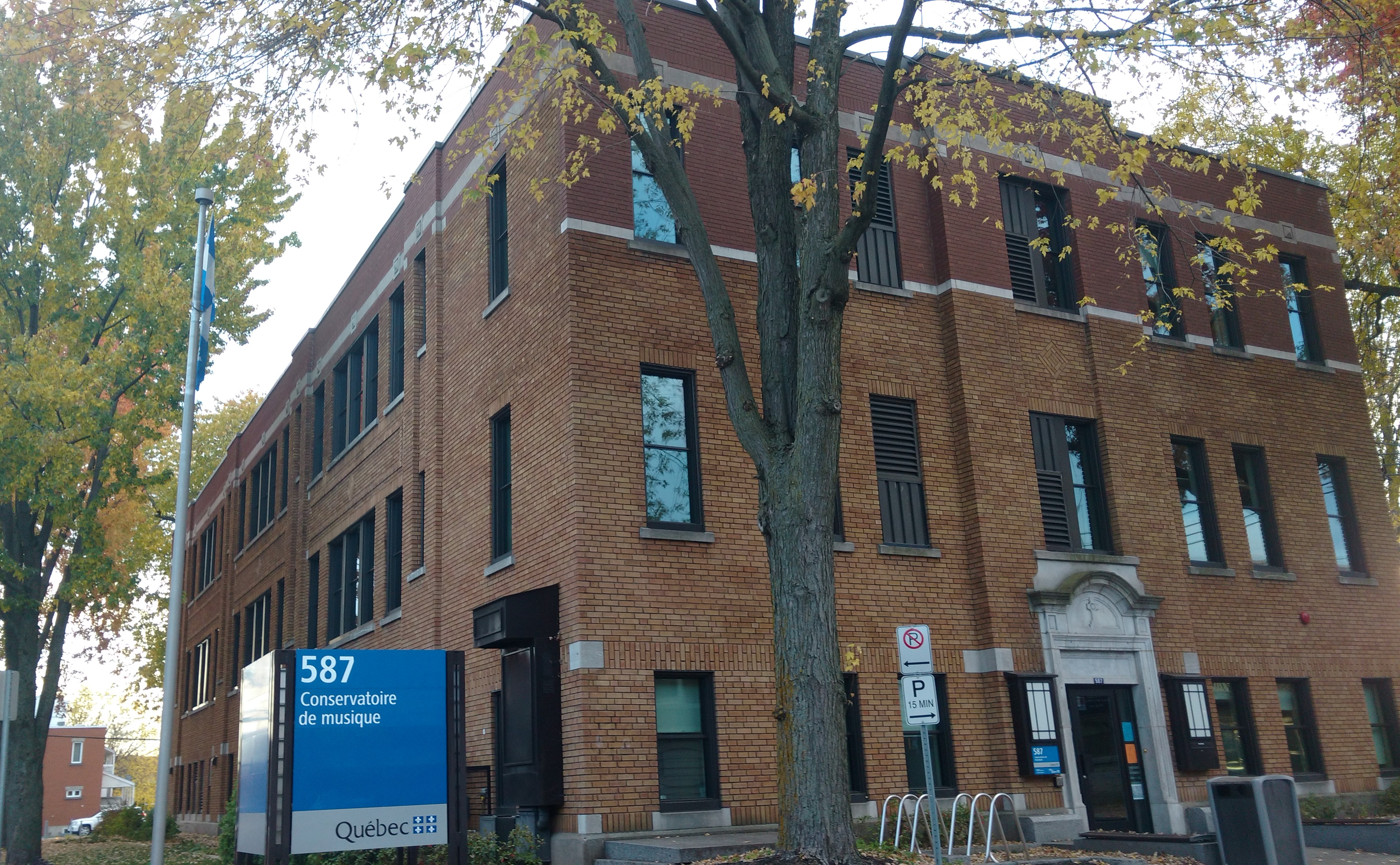 Conservatoire de Musique de Trois-Rivières.